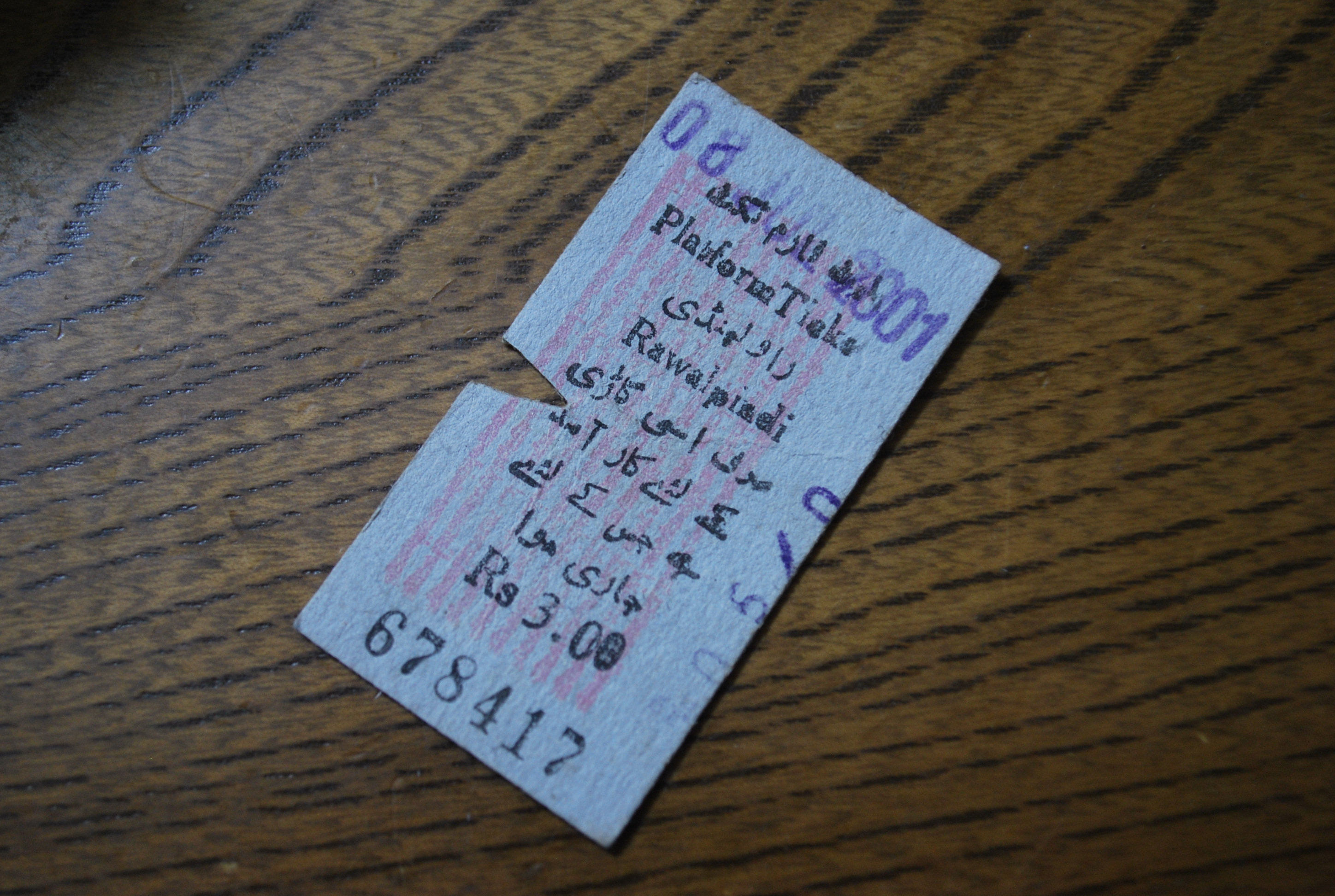 パキスタンの駅入場券。ラーワルピンディ駅。